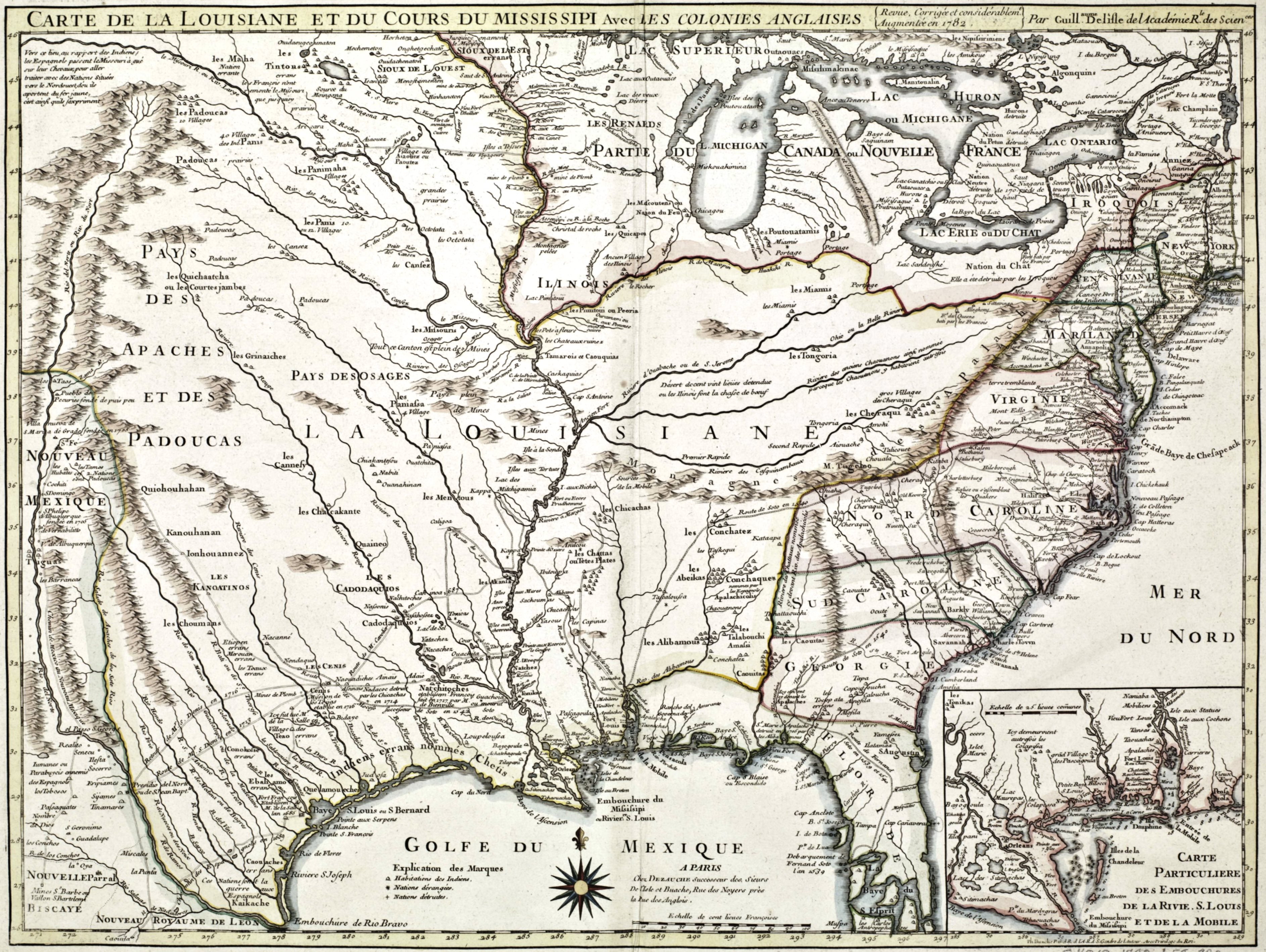 Carte de la Louisiane et du cours du Mississipi avec les colonies anglaises revue, corrigée et considérablement augmentée en 1782